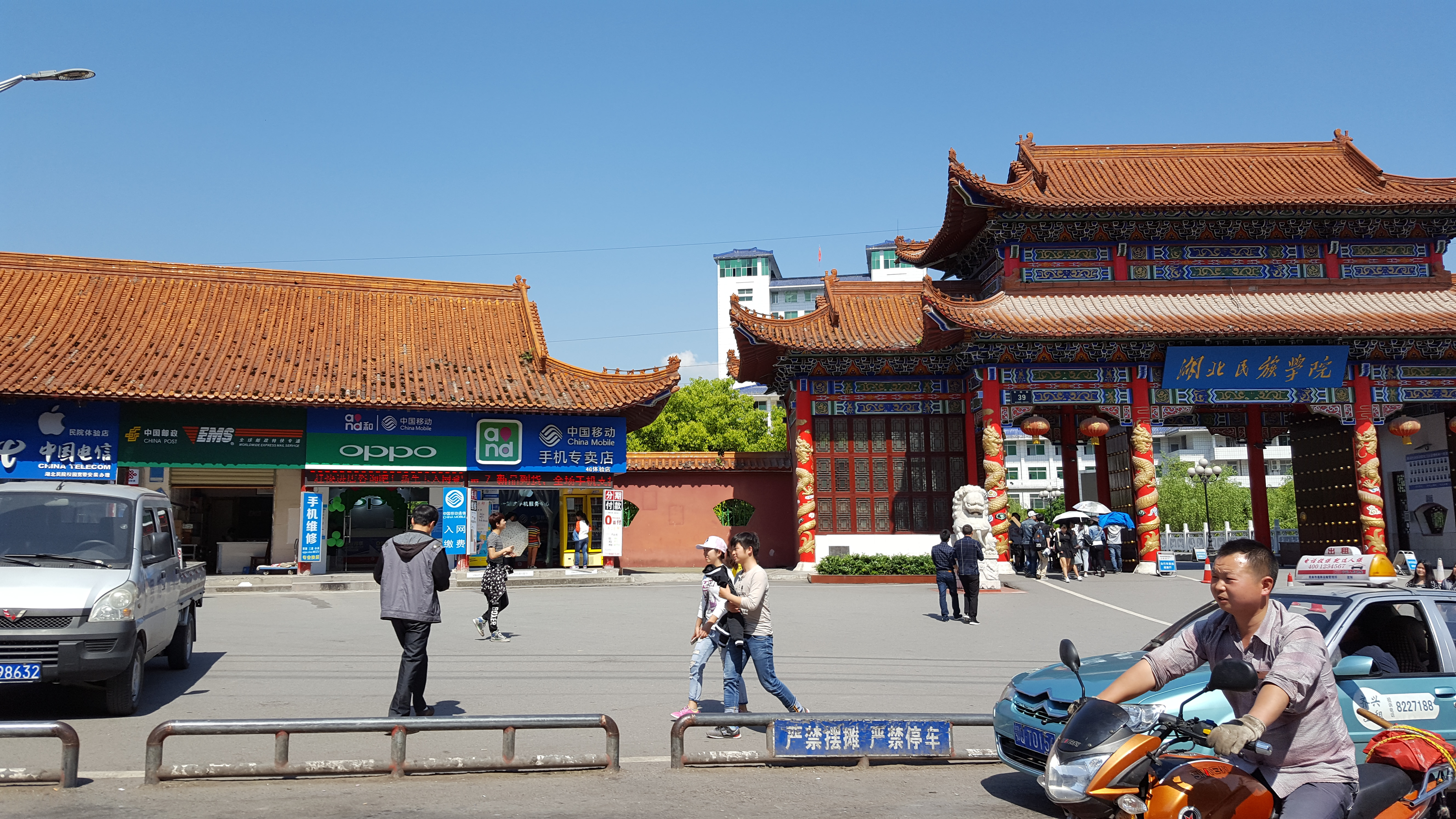 中文（中国大陆）: 湖北民族学院